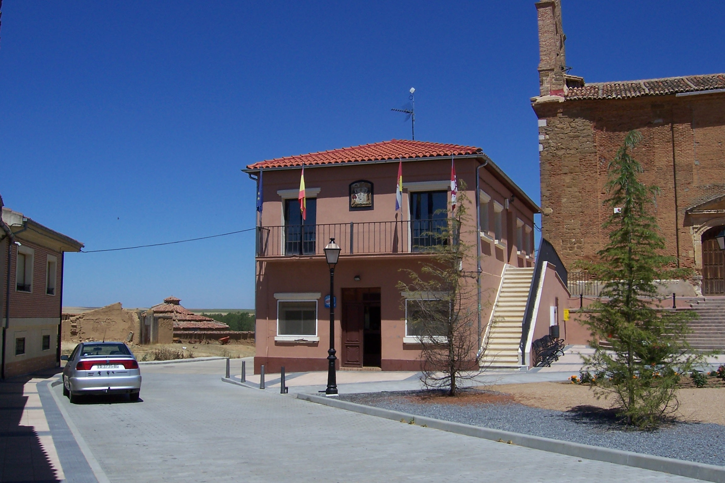 Villamuriel de Campos, provincia de Valladolid, España. Edificio del Ayuntamiento.